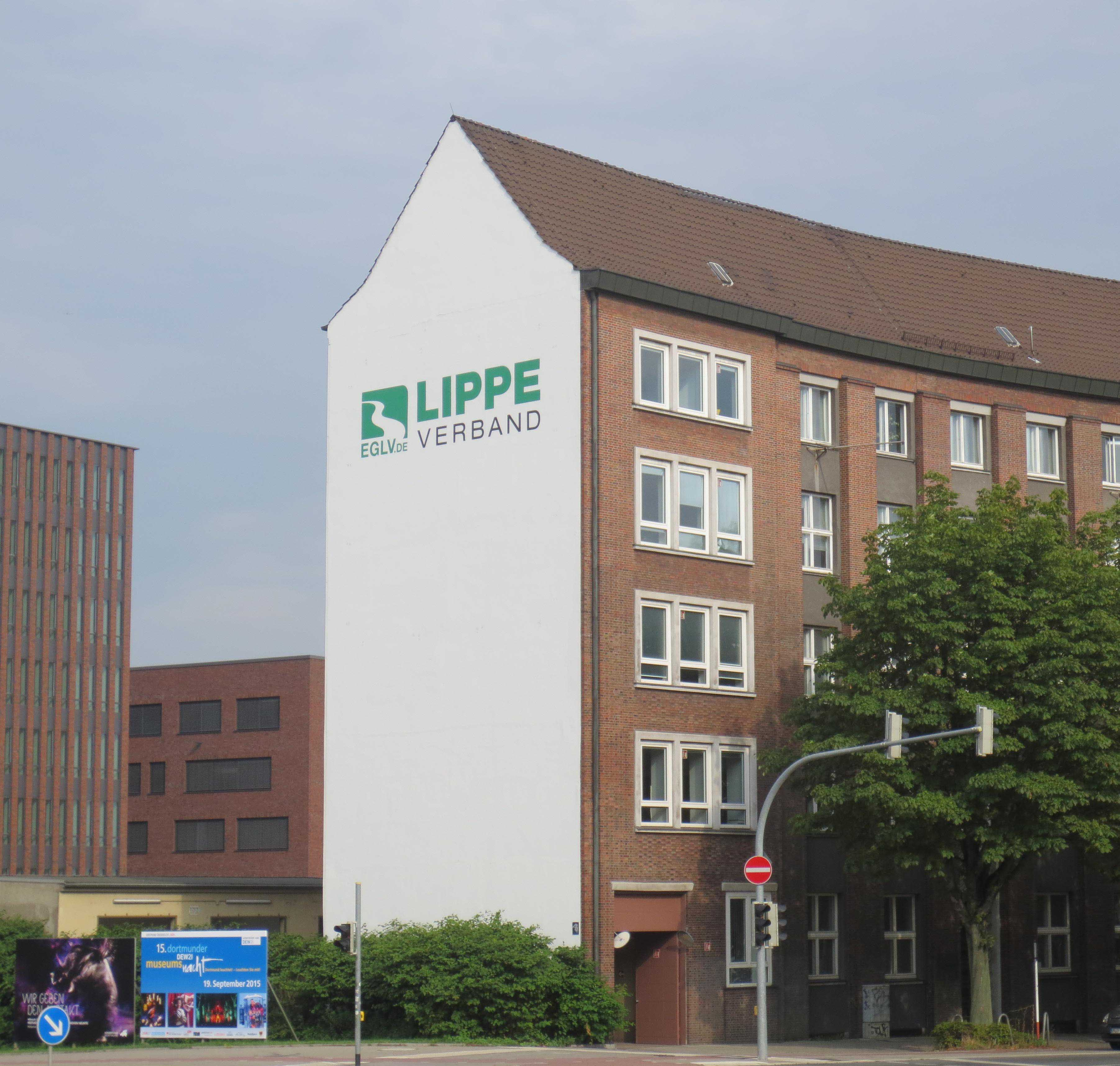 Verwaltungsgebäude des Lippeverbandes in Dortmund